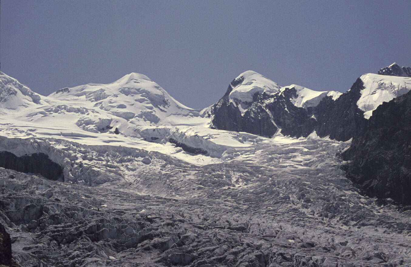 Castor (links) und Pollux mit Zwillings- und Grenzgletscher 1982, Wallis, Schweiz/Italien